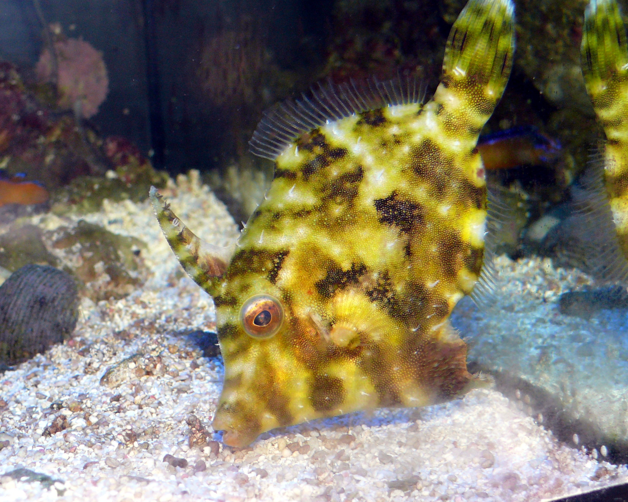 Seegras- oder Tang-Feilenfisch (Acreichthys tomentosus), Schreckfarbe